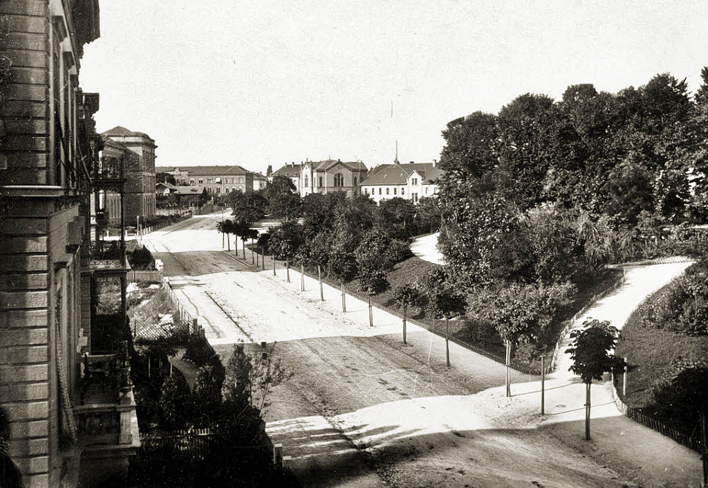 Blick über die neue Werderstraße nach Nordosten.